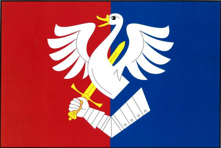 Chválenice vlajka